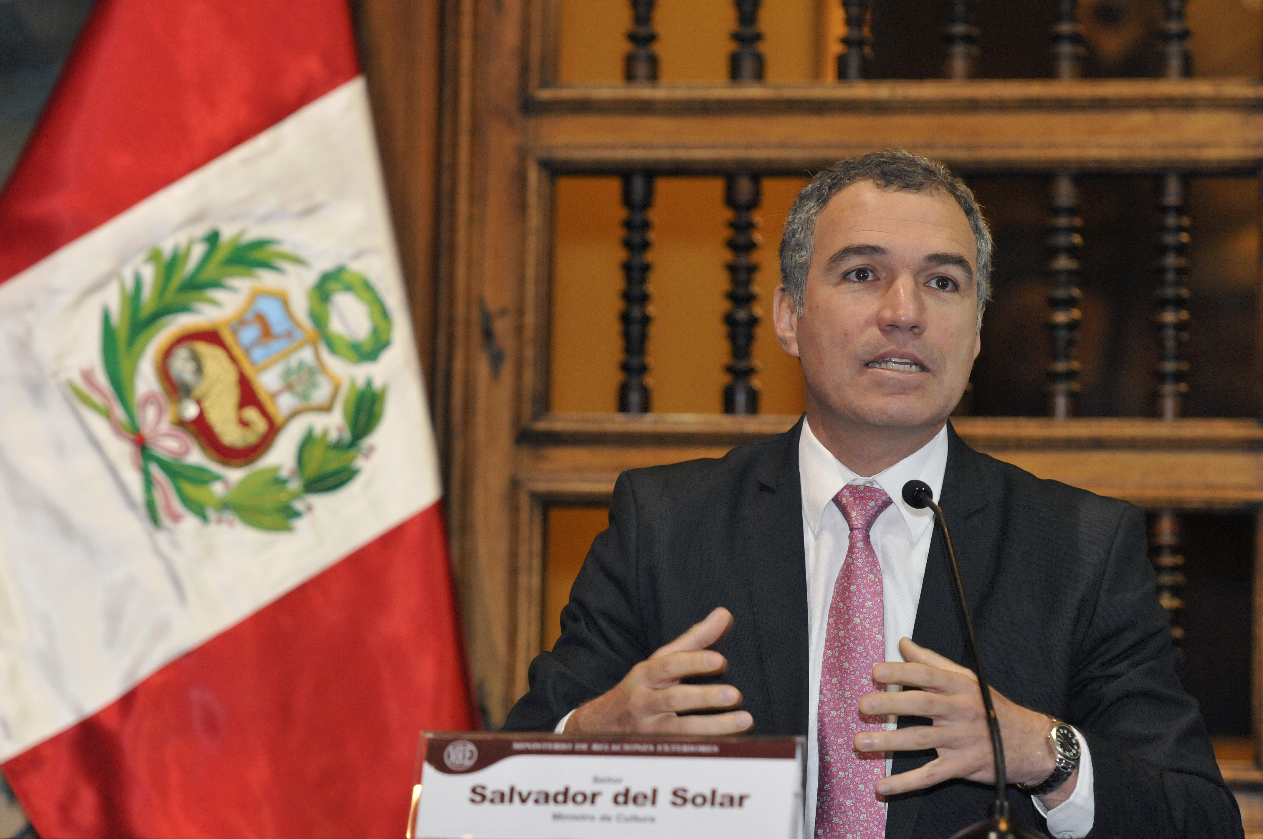 El Ministro de Relaciones Exteriores del Perú, Embajador Ricardo Luna Mendoza, hizo entrega formal al Ministro de Cultura, Salvador del Solar Labarthe, de un lote de bienes culturales, conformado por más de 500 piezas pertenecientes al Patrimonio Cultural de la Nación, las cuales fueron repatriadas de Alemania, Argentina, Bolivia, España, Estados Unidos, Francia, Italia y México. En dicho acto, celebrado hoy en el Salón de Embajadores del Palacio de Torre Tagle, ambas autoridades suscribieron un convenio de cooperación interinstitucional que permitirá el préstamo de los bienes a las Embajadas del Perú en el exterior para contribuir en la difusión de la política cultural de nuestro país a nivel internacional.